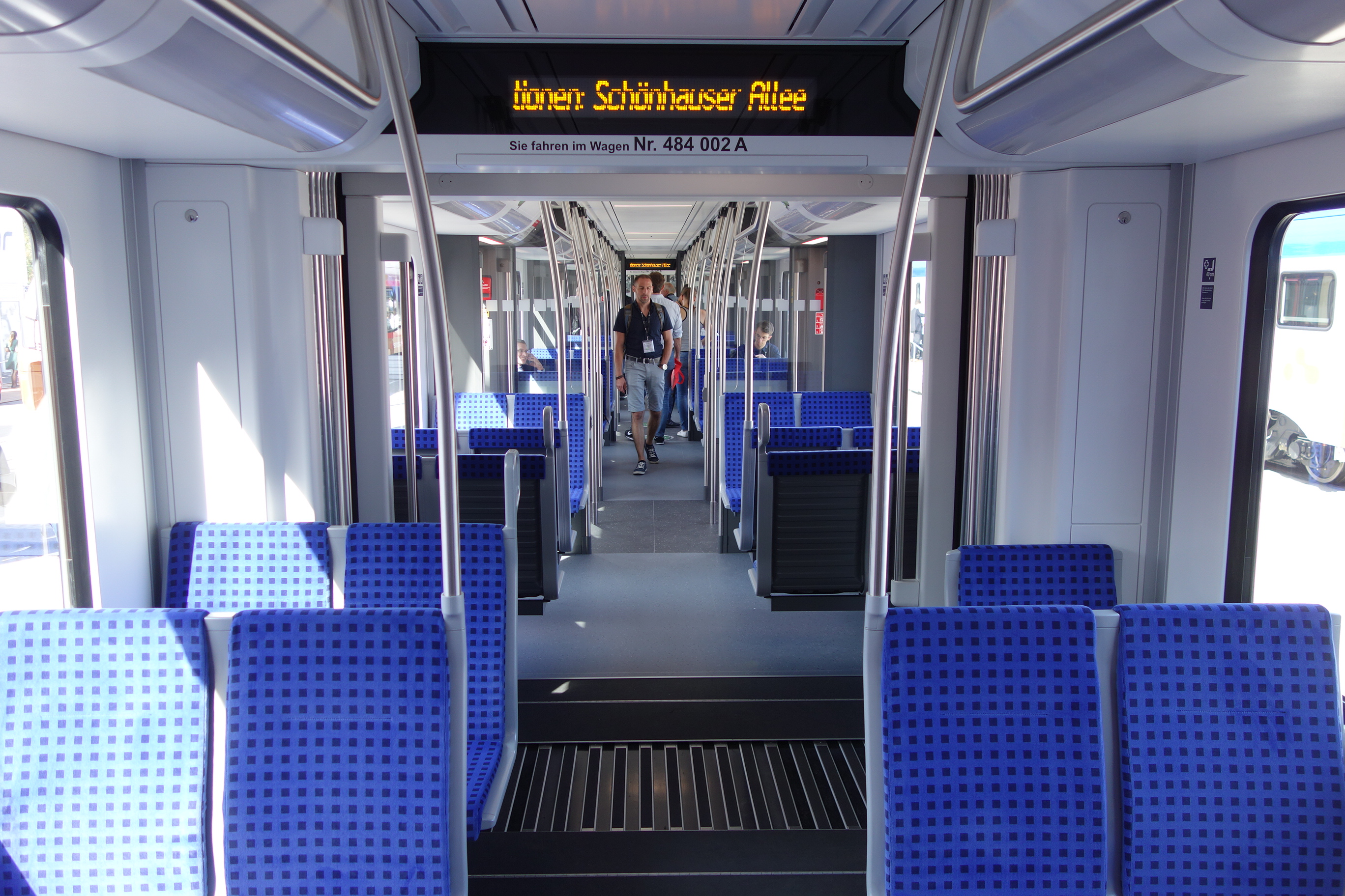 DB-Baureihe 484 für die S-Bahn Berlin auf der InnoTrans 2018, Innenraum